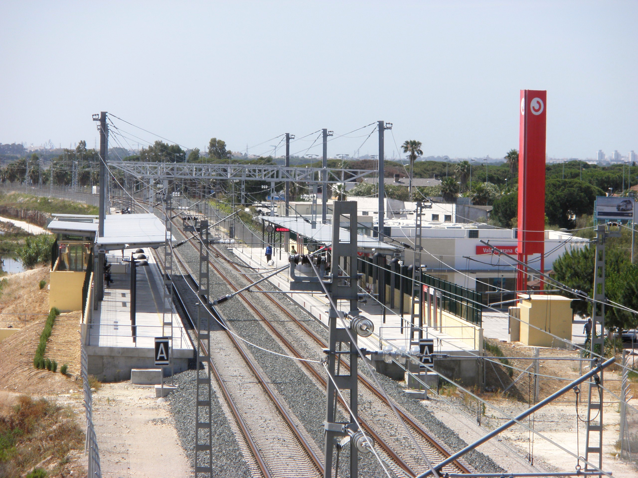 Estación de trenes de Valdelagrana, El Puerto de Santa María, provincia de Cádiz, España.